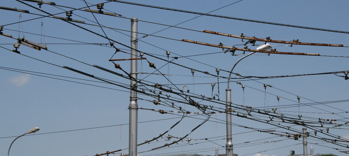 Komplizierte Fahrleitungskonstruktion mit Weichen, Streckentrennern und Stromeinspeisungen auf der Ausfahrseite des vbl-Depots Weinbergli